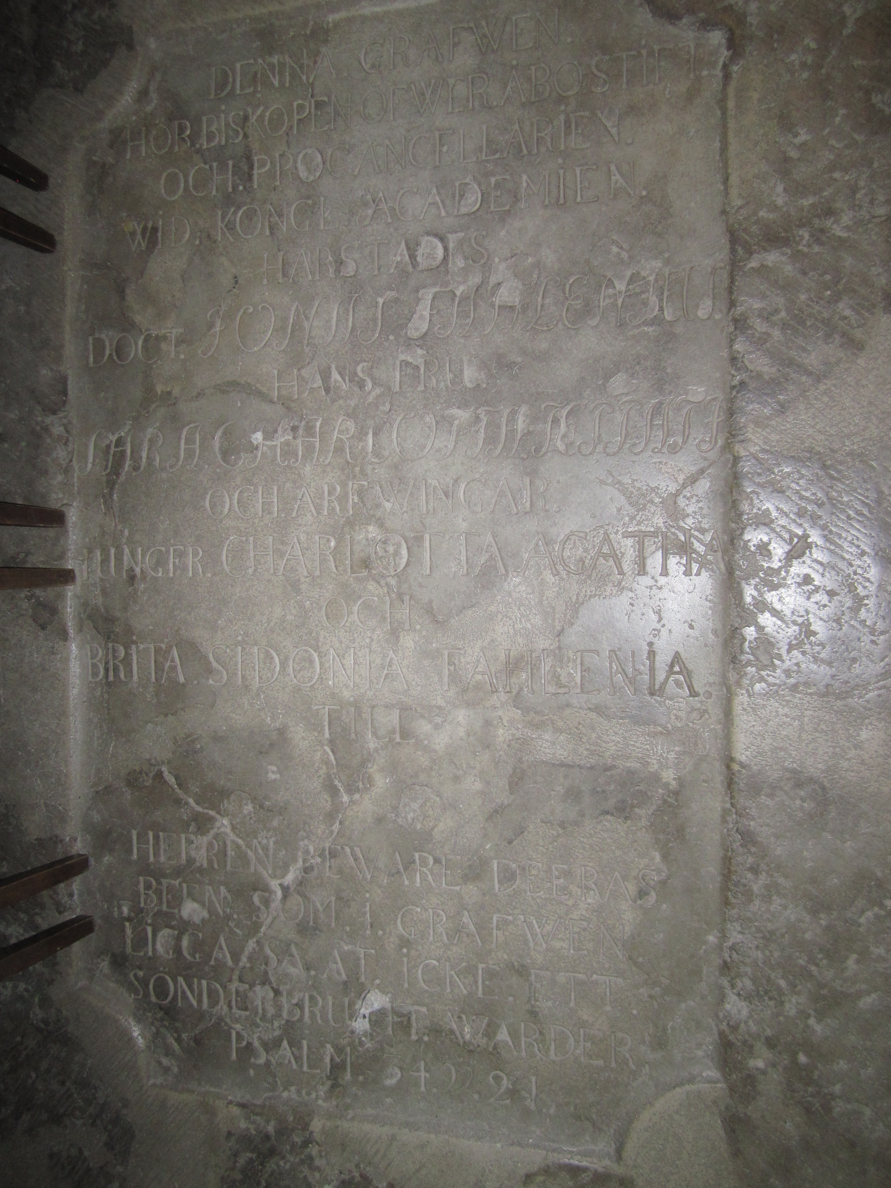 Jonas Fahlenius och Sara Charlotta Teppatis gravsten från Åbo dom kyrka. Stenen ligger i golvet nära altaret.